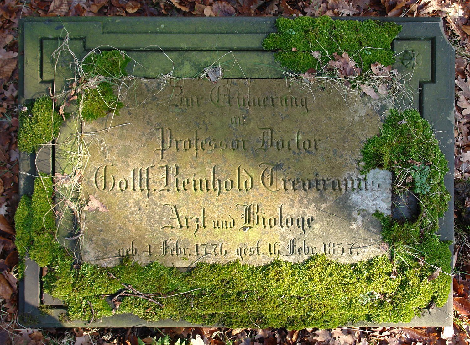 Osterholzer Friedhof in Bremen: Grabstein Gottfried Reinhold Treviranus (1776-1837)